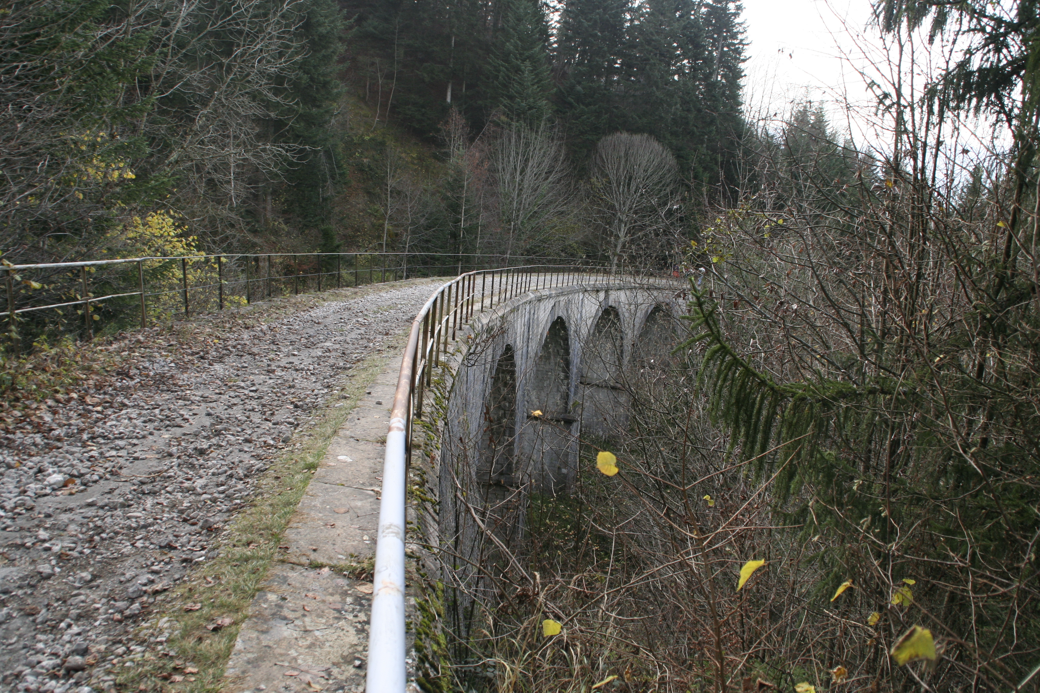 Le viaduc hélicoïdal des Fontanelles est un ouvrage d’art du tracé de l’ancienne ligne de chemin de fer à crémaillère entre Aix-les-Bains et le Revard.